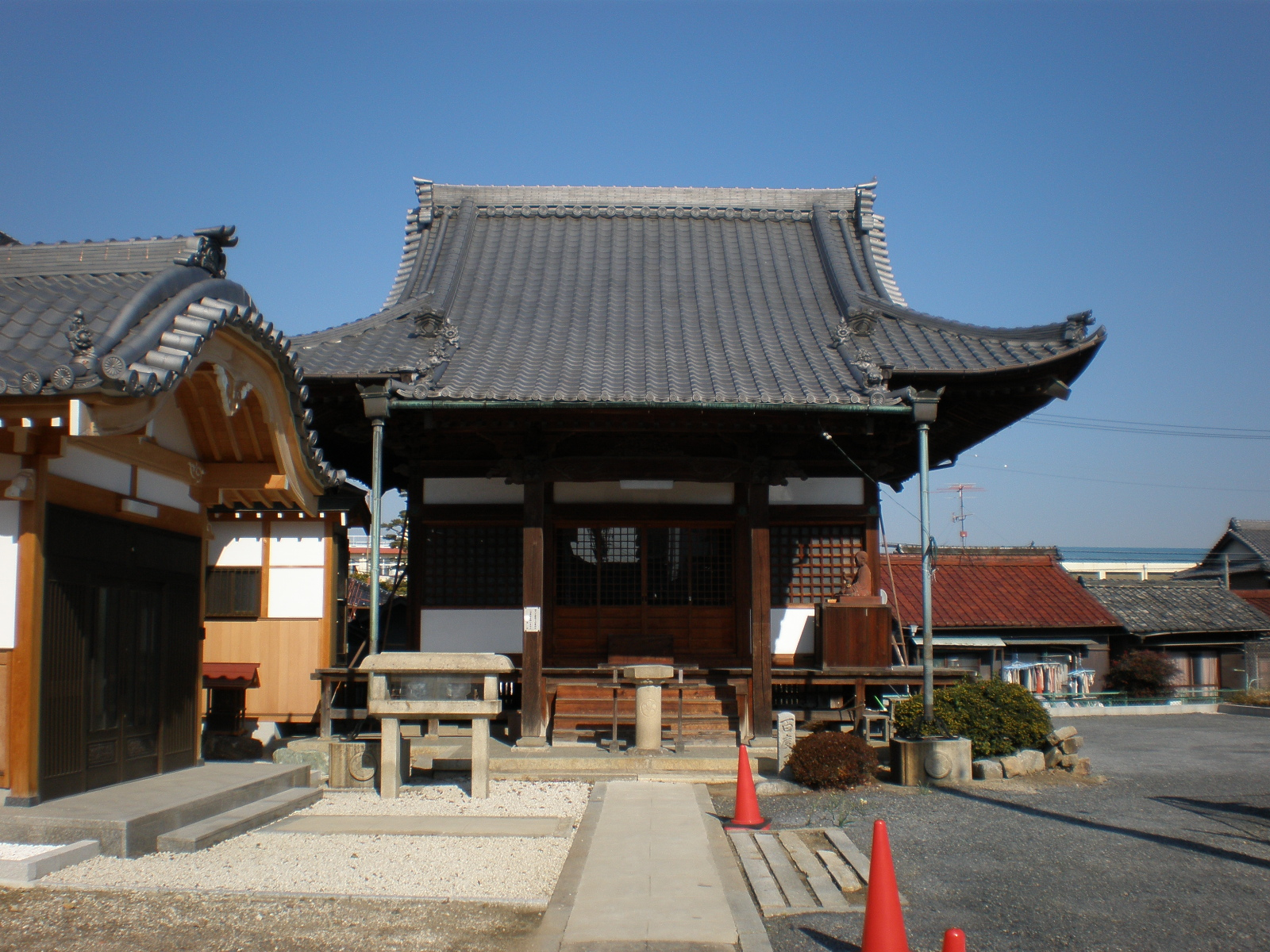 愛知県小牧市にある戒蔵院の本堂